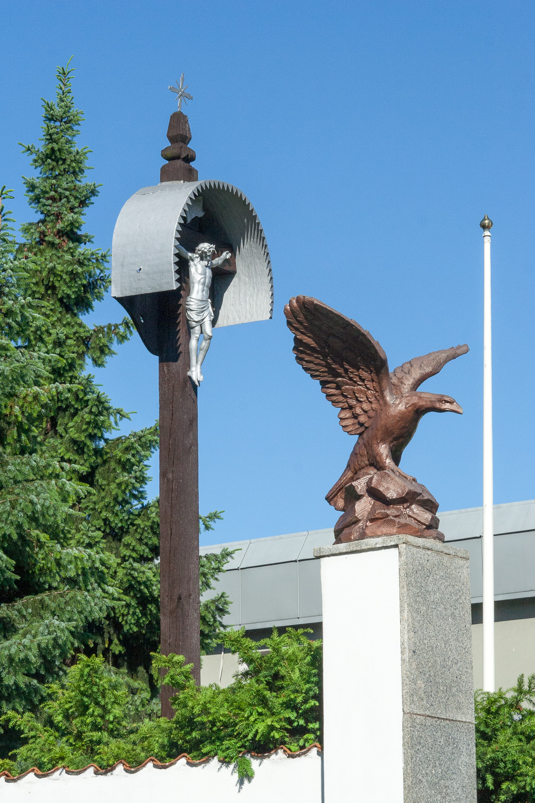 Drewniany krzyż poświęcony ofiarom powstania listopadowego (od strony muru austerii wawerskiej), postawiony tuż po odzyskaniu przez Polskę niepodległości w 1919 r. Warszawa Wawer. Napisy: kamień: Ś. + P. POLEGŁYM ZA OJCZYZNĘ W DNIACH 19.GO LUTEGO I.31.MARCA 1831.R. płyta poniżej: A JEŚLI KOMU DROGA OTWARTA DO NIEBA TYM CO SŁUŻĄ OJCZYŹNIE JAN KOCHANOWSKI W MOGILE TEJ SPOCZYWAJĄ PROCHY ŻOŁNIERZY POWSTANIA LISTOPADOWEGO POLEGŁYCH W ZWYCIĘSKICH BITWACH 19 LUTEGO I 31 MARCA 1831 R. W 170 ROCZNICĘ ZWYCIĘSTWA POD WAWREM 31 MARCA 2001 R. MIESZKAŃCY GMINY WARSZAWA WAWER Lokalizacja: M-y ul.Płowiecka 83 (Austerią Wawerską, Karczmą Wawerską,tuż przy murze) a ul. Płowiecka 85.